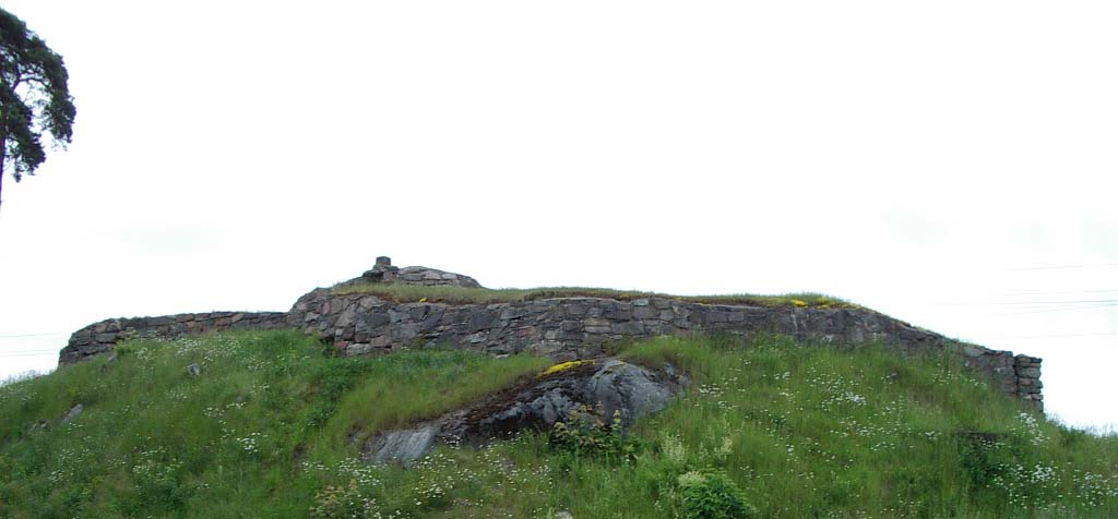 Edsholms slottsruin vid Grums